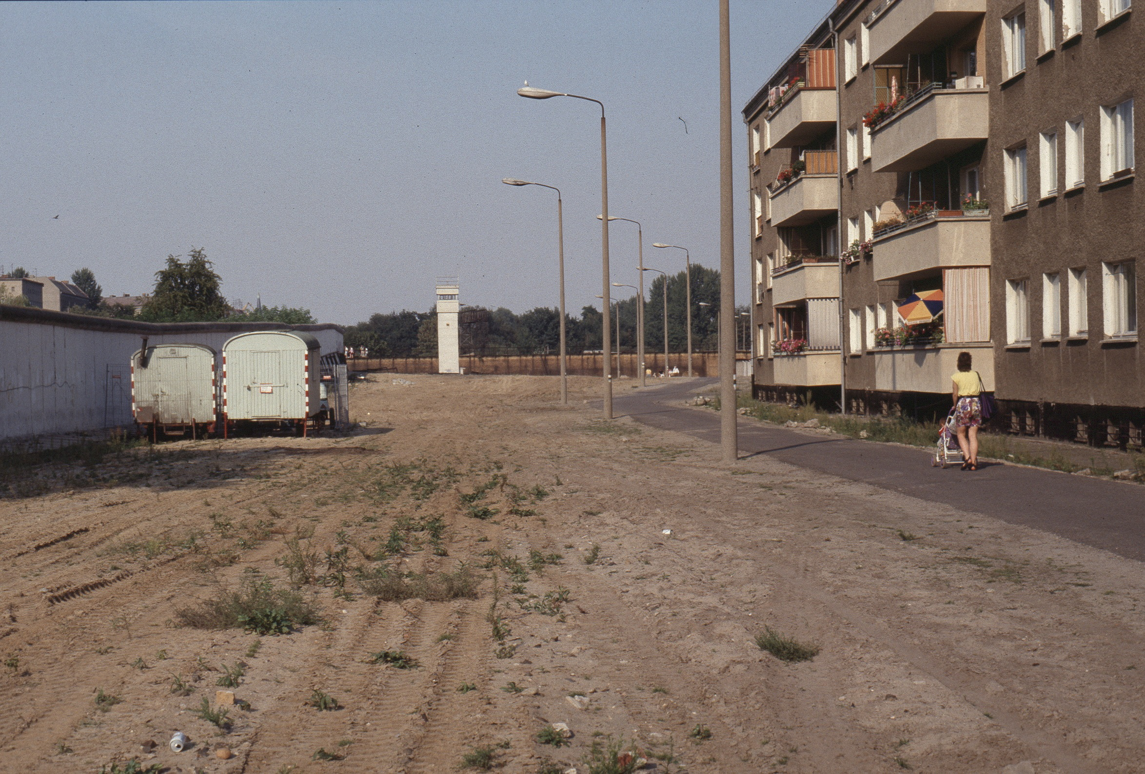 Wiesenufer Berlin (ehemaliger Todesstreifen)